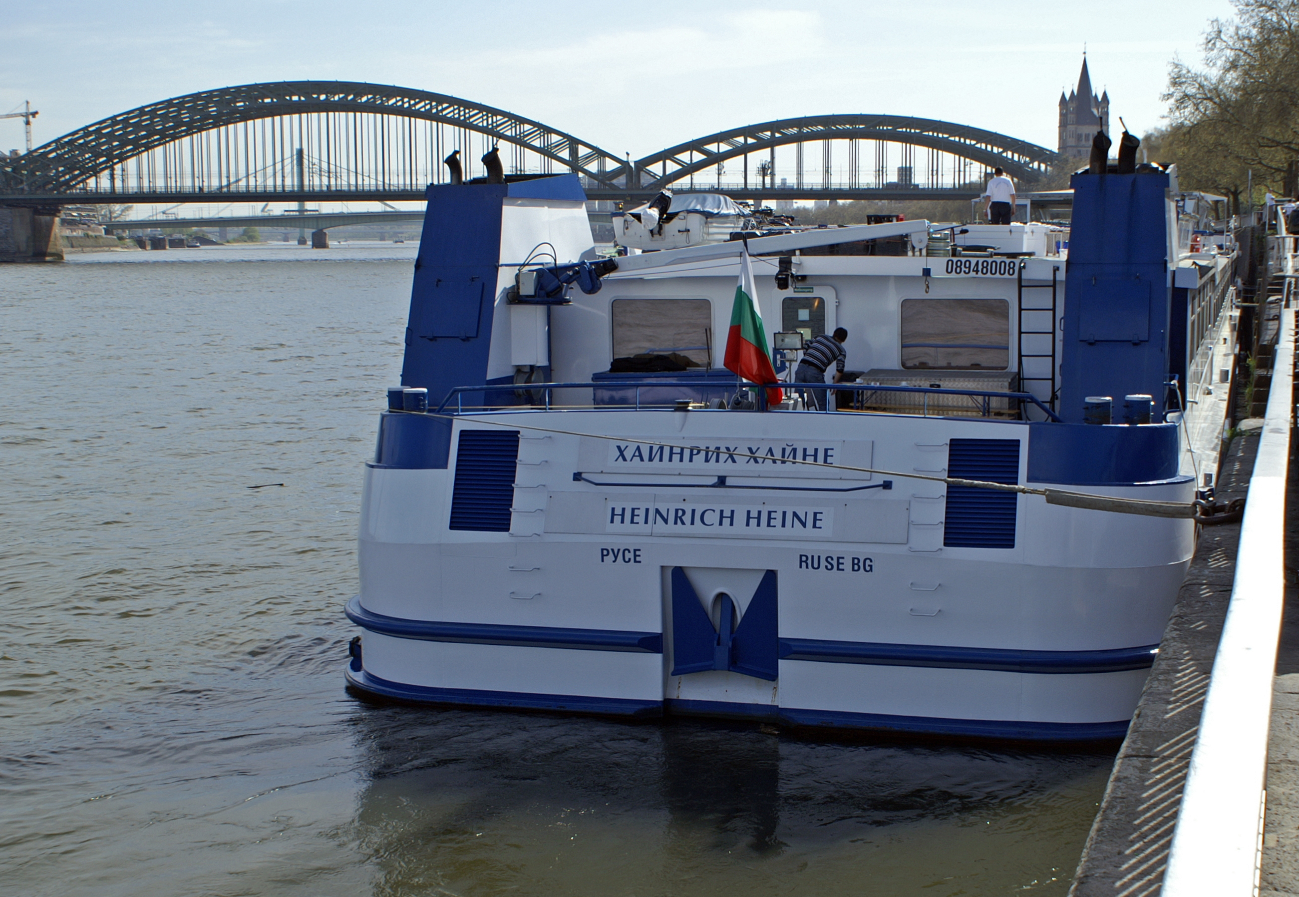 Die Flusskreuzfahrtschiff Heinrich Heine am Anleger Köln.